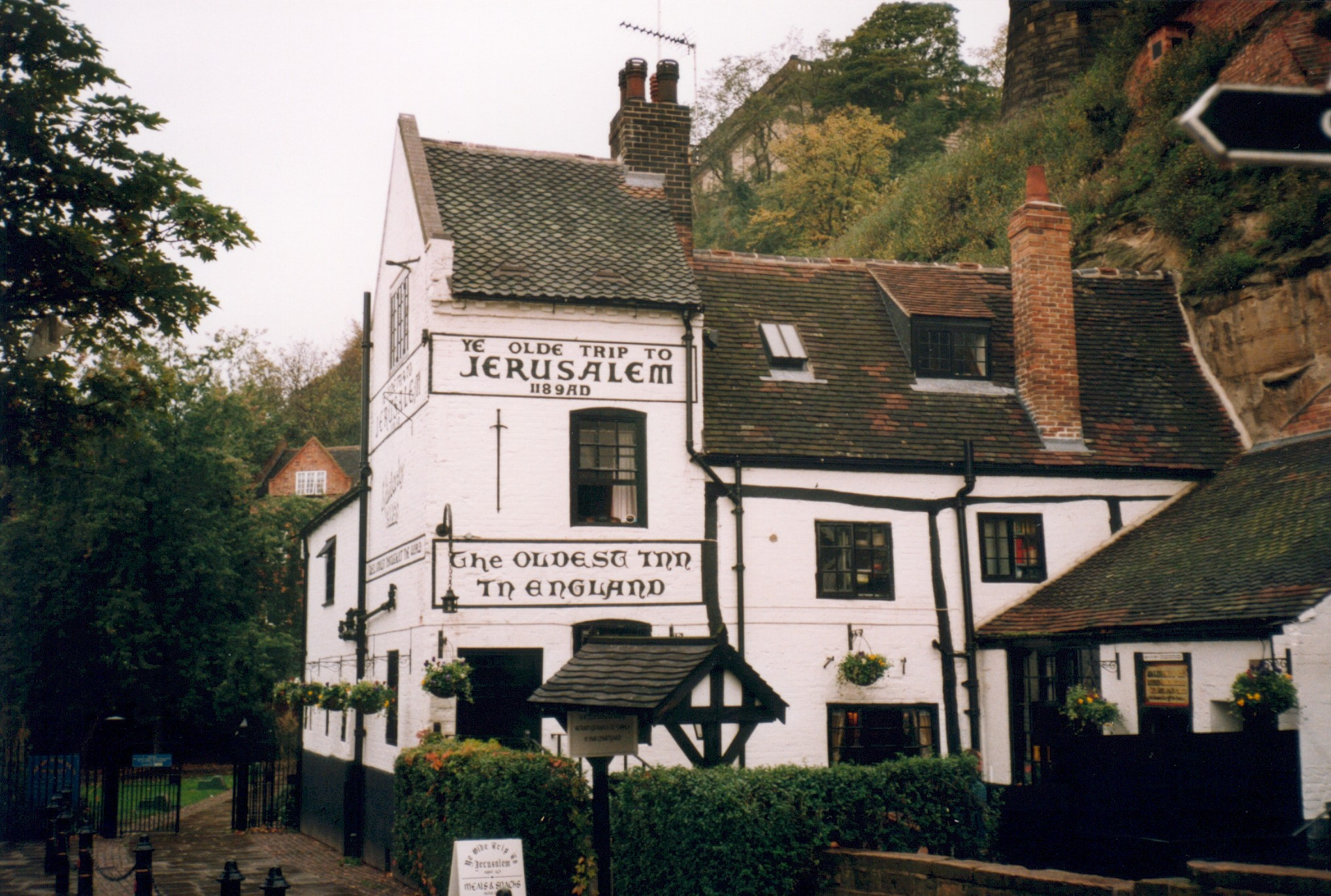 'Ye Olde Trip To Jerusalem', der (angeblich) älteste Pub in England